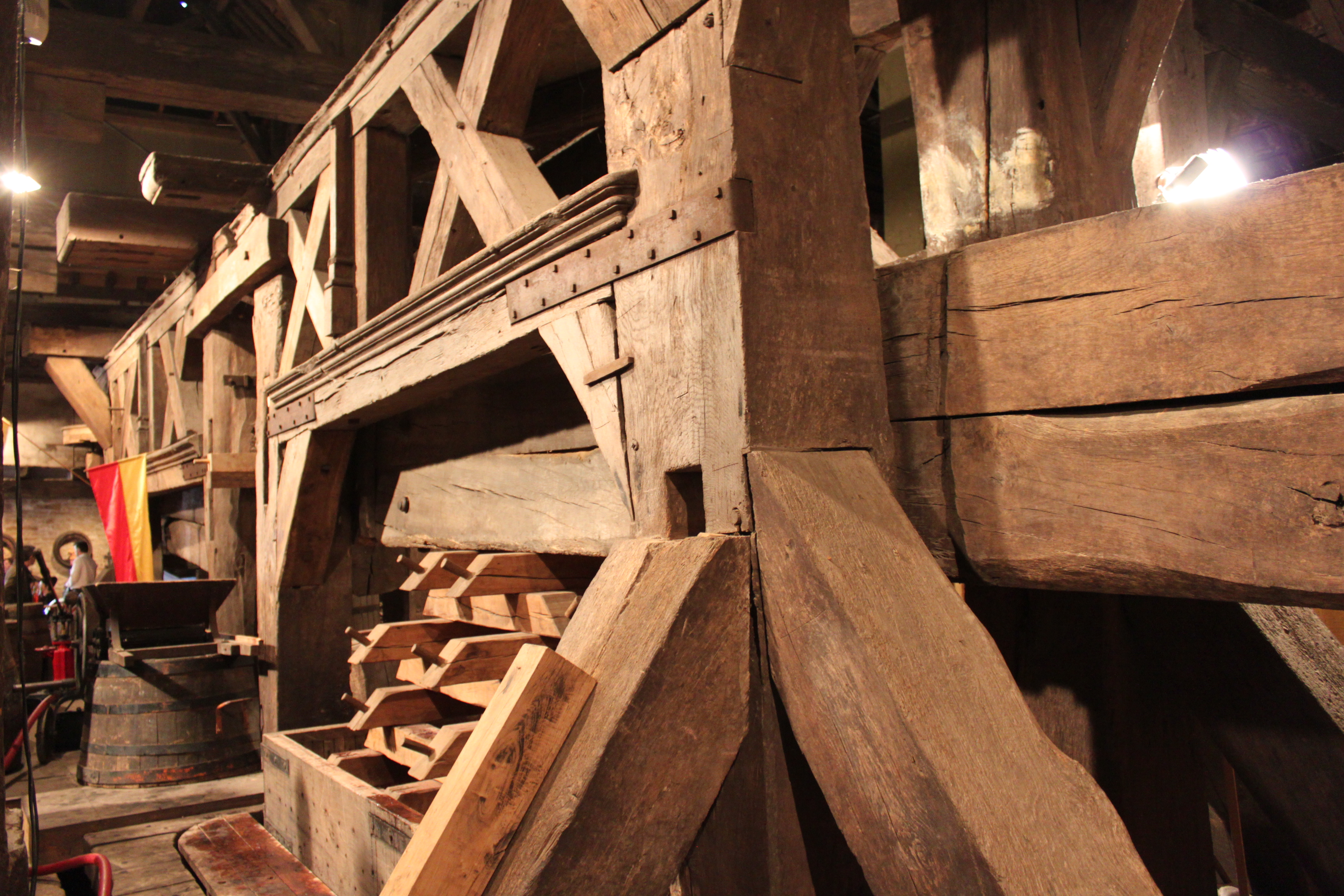 Pressoir des ducs de Bourgogne, Chevigny, Côte-d'Or, Bourgogne, FRANCE